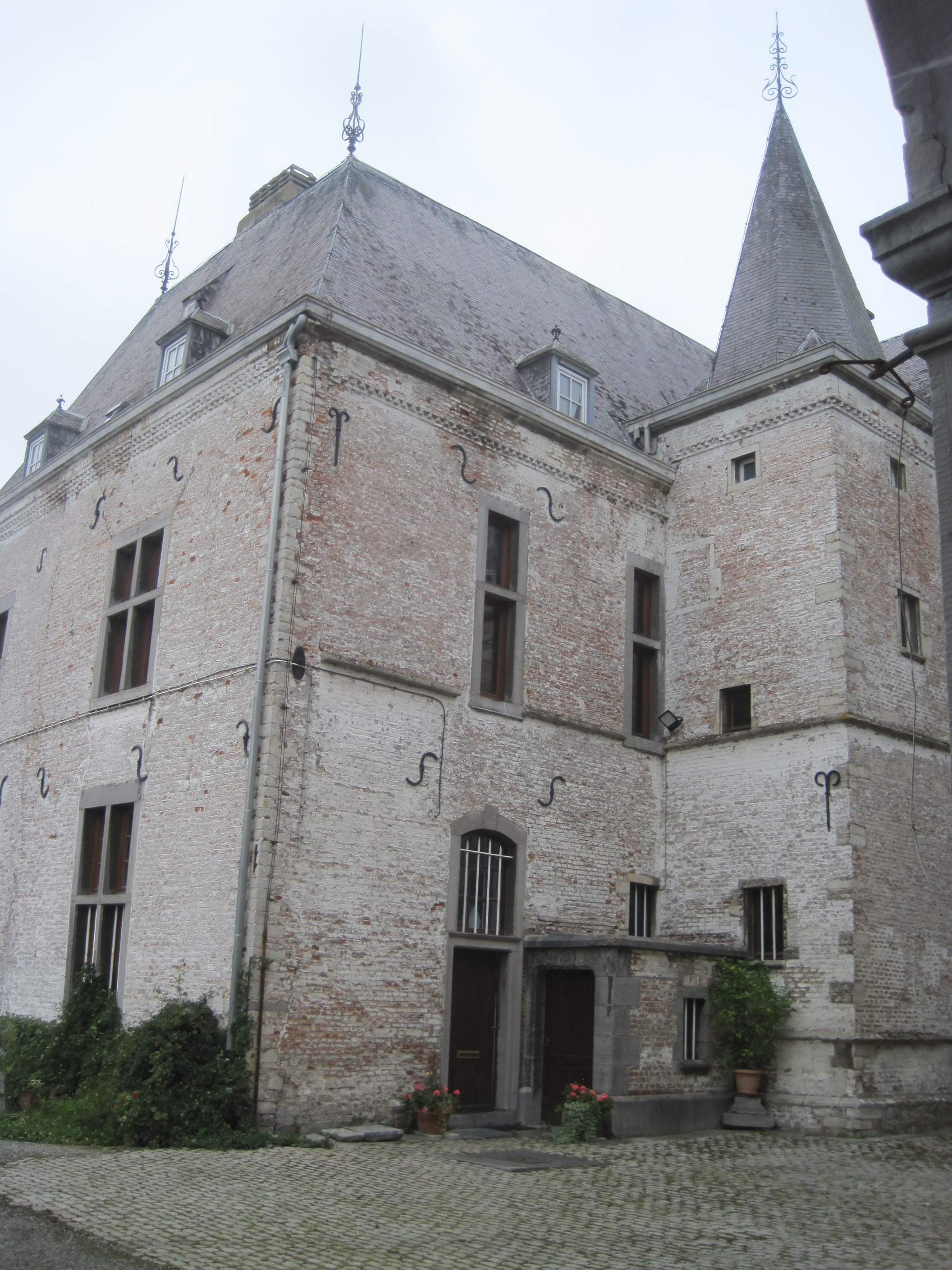 Vue des appartements du château depuis la cour.